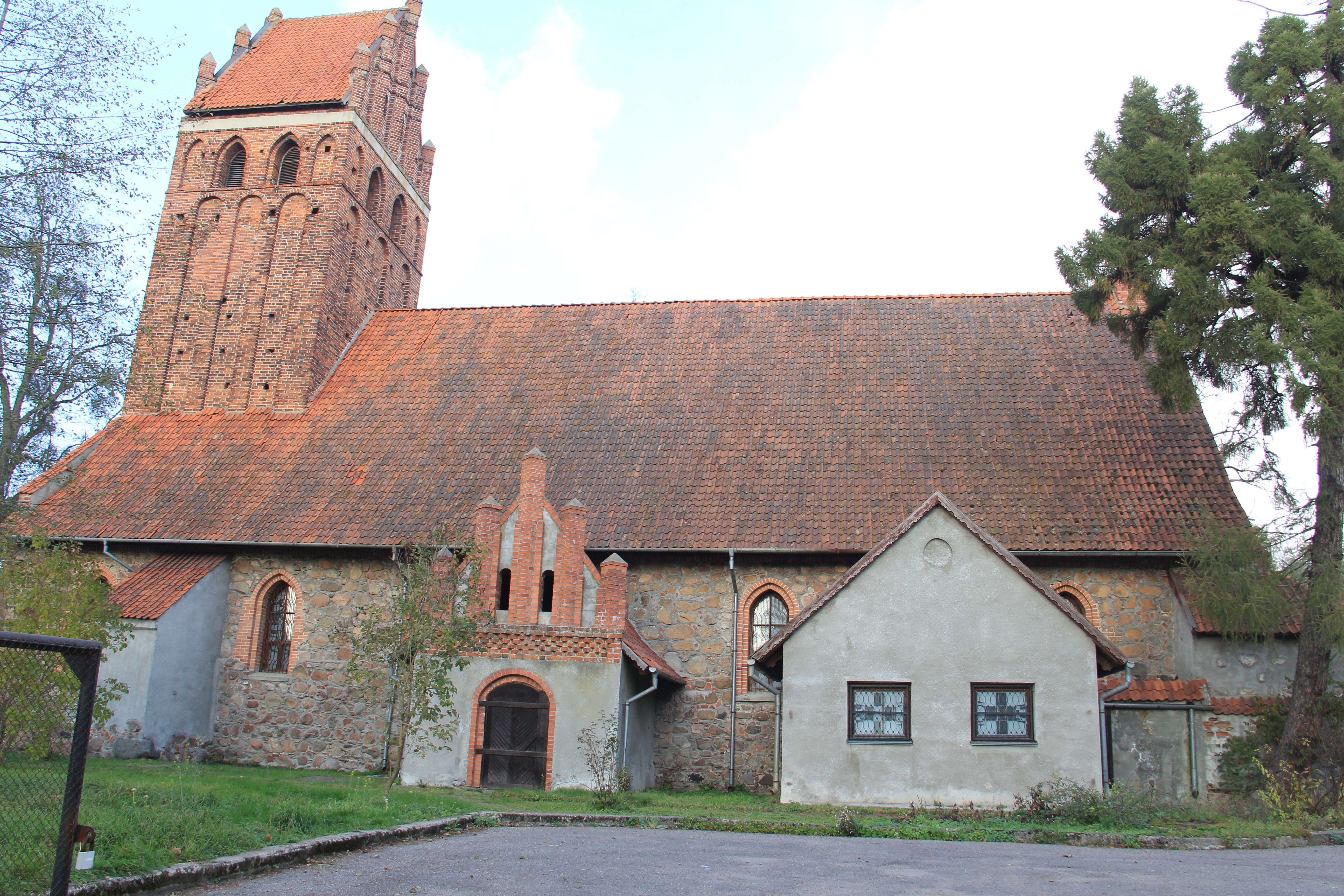 Приходская церковь (Калиниградская область, Гурьевск, город гурьевск, заречная улица, 5)